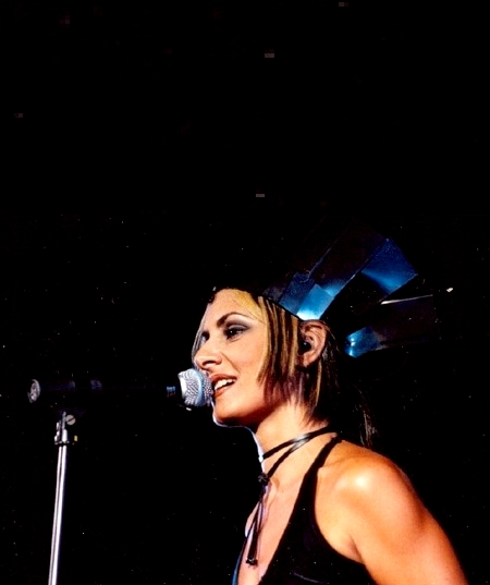 Cantora Fernanda Abreu durante a turnê De Lata, em 1997. Foto: Alice Abreu: Assessoria de Imprensa Fernanda Abreu